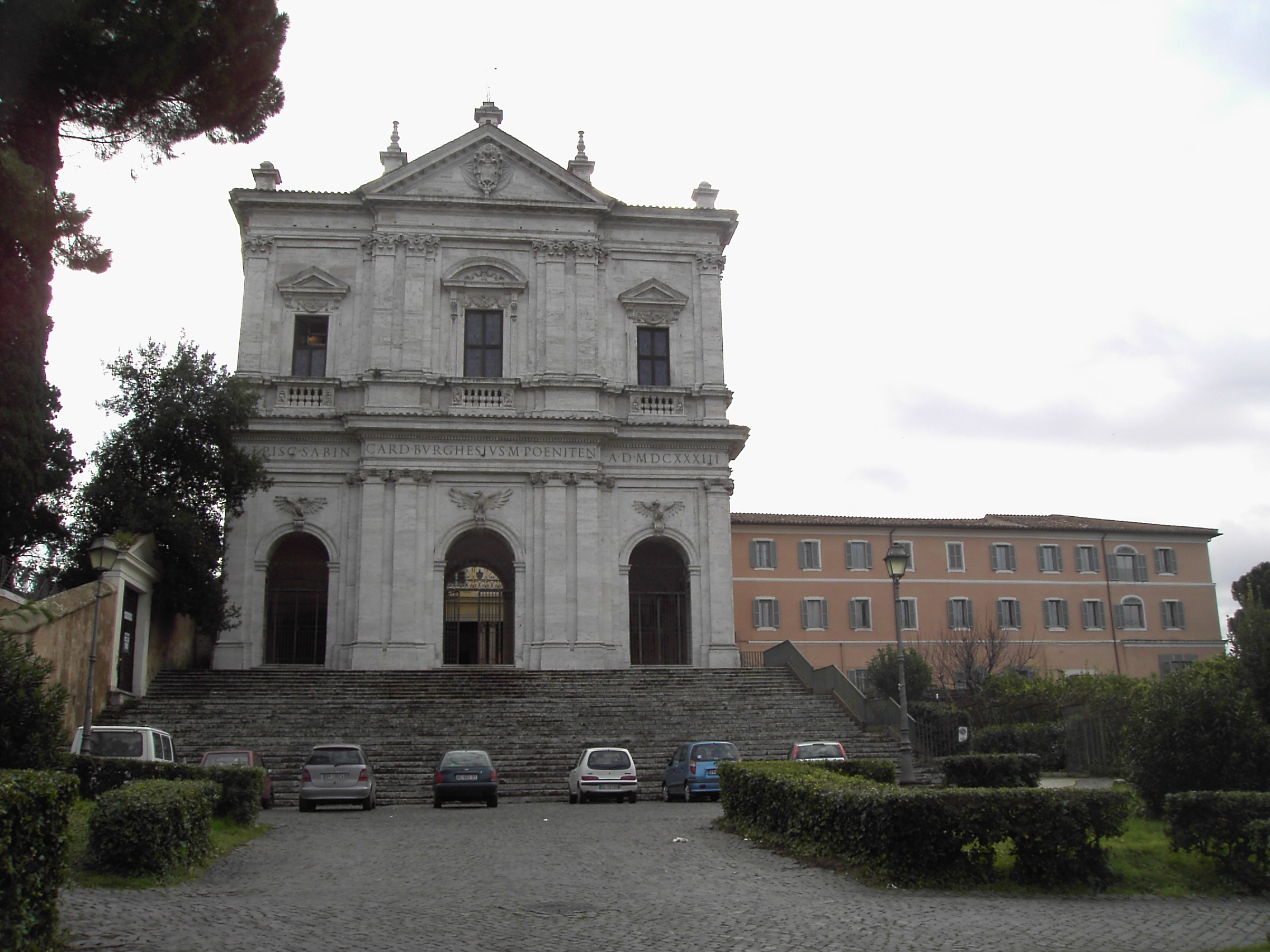 Roma, complesso di san Gregorio al Celio, chiesa e convento.